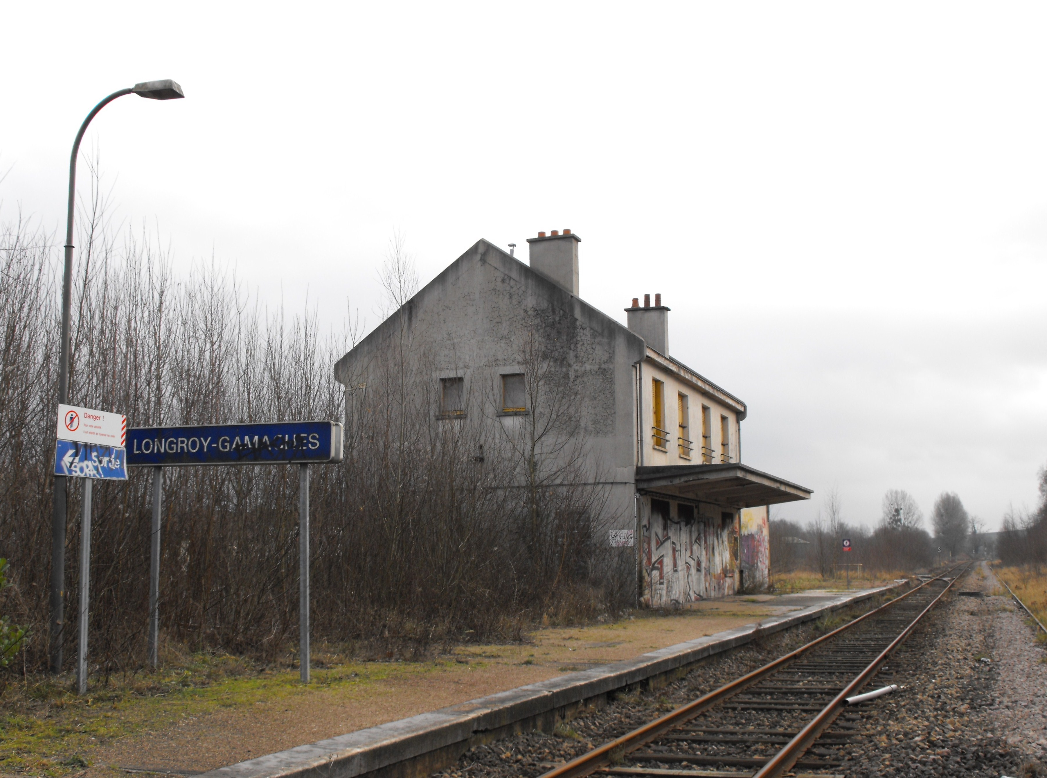 Le bâtiment voyageurs de la gare de Longroy-Gamaches